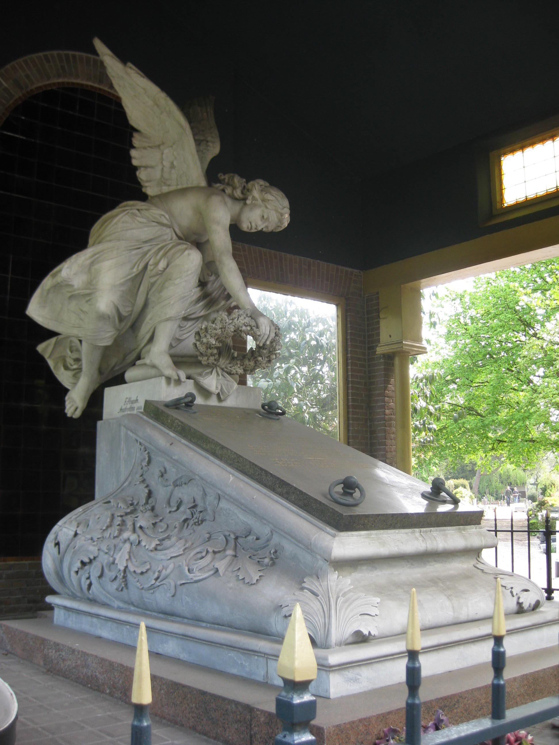 Beeld ontworpen door Frans Stracké in het Rijksmonumentale graf van de familie Dorrepaal op begraafplaats Zorgvlied in Amsterdam